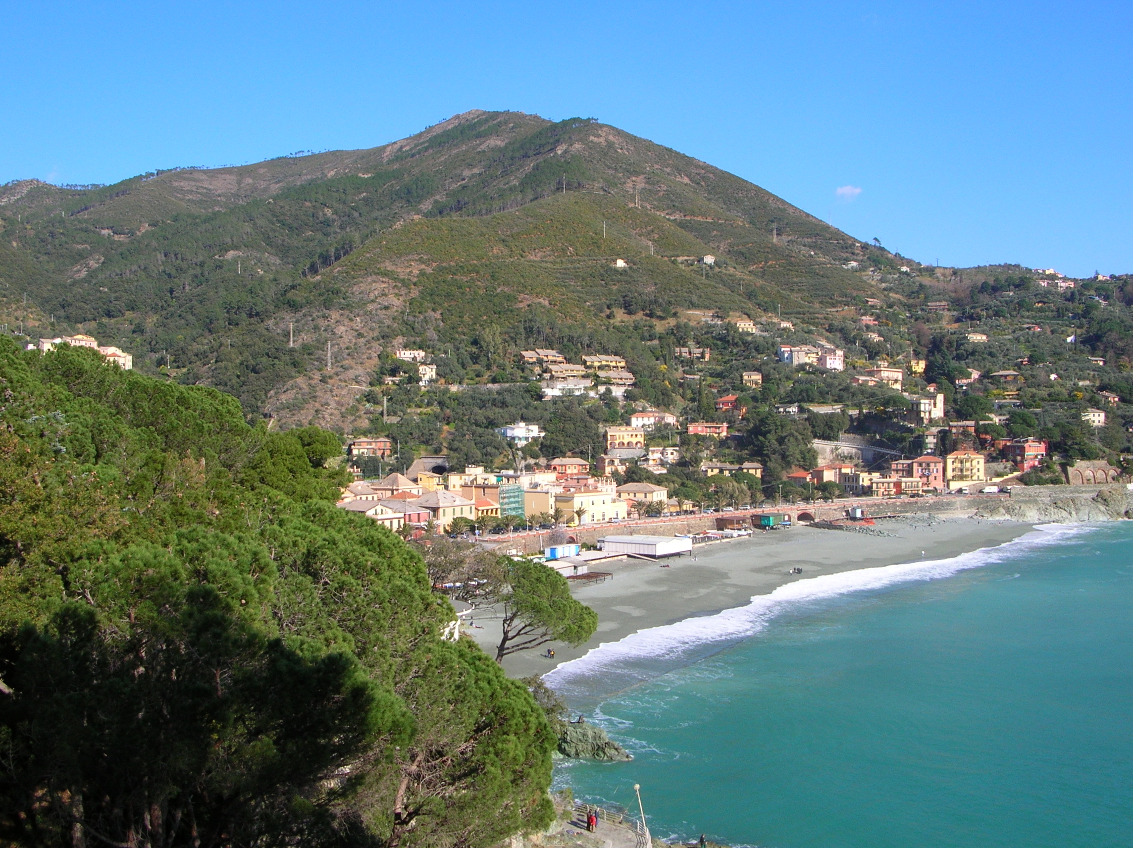 Bonassola, provincia della Spezia, Liguria, Italia.